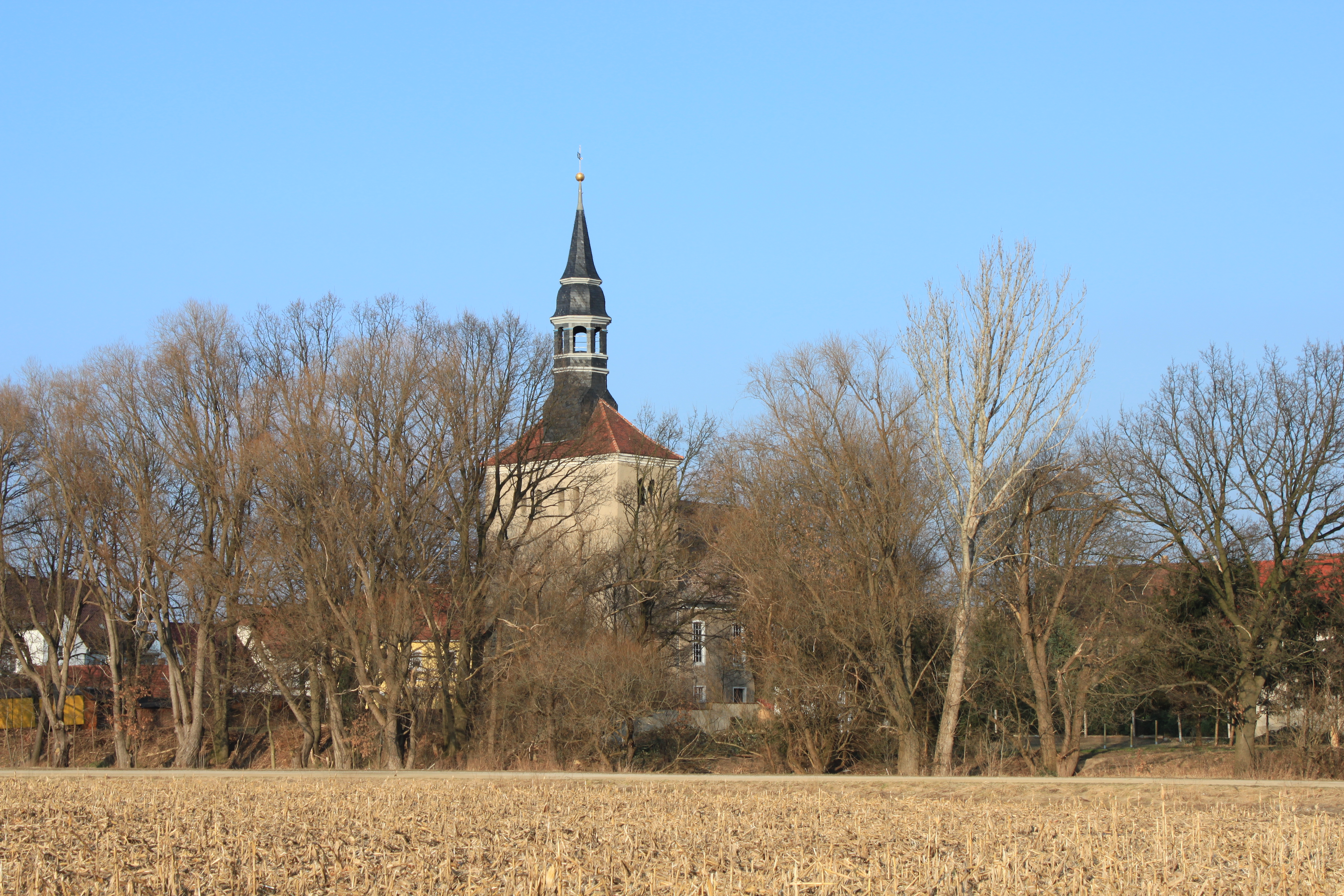 Kirche in Koßdorf